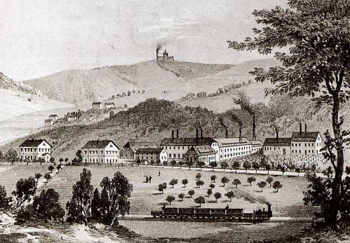 Zug der Albertsbahn AG im Plauischen Grund